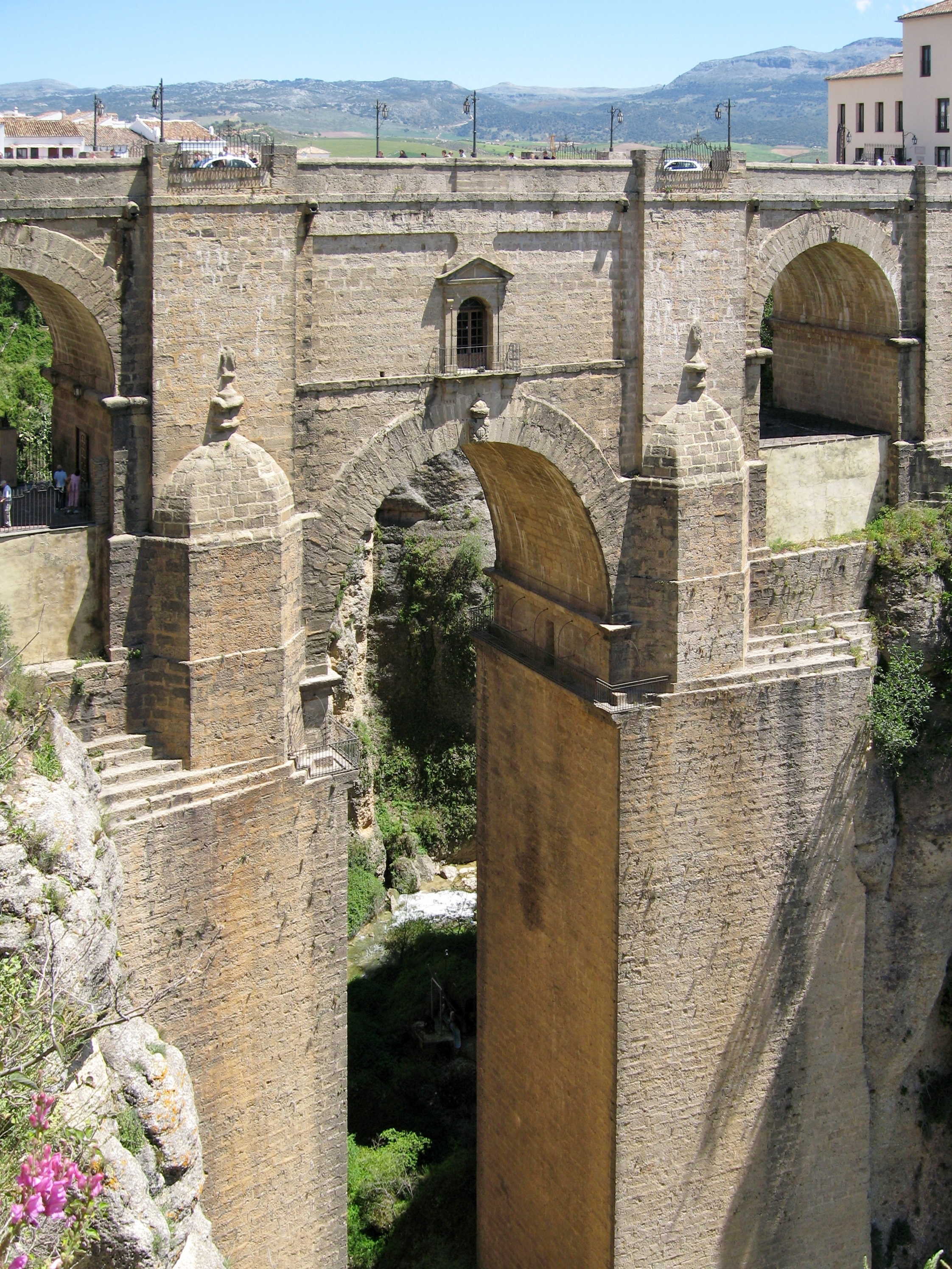 Neue Brücke (Puente Nuevo) über den Río Guadalevín in Ronda, Provinz Málaga, Andalusien, Spanien